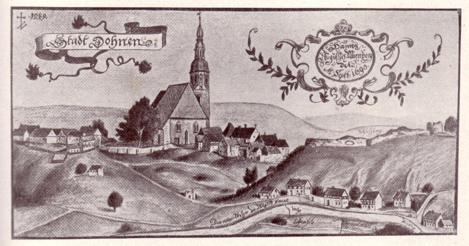 Dohna 1690, rechts die Burgreste